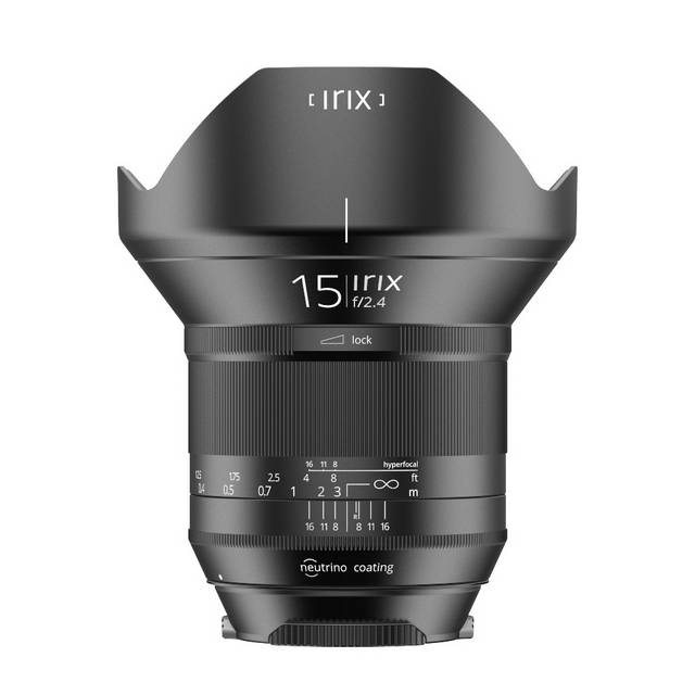 un grana ngular para Full Frame y APS-C de origen Suizo y Coreano